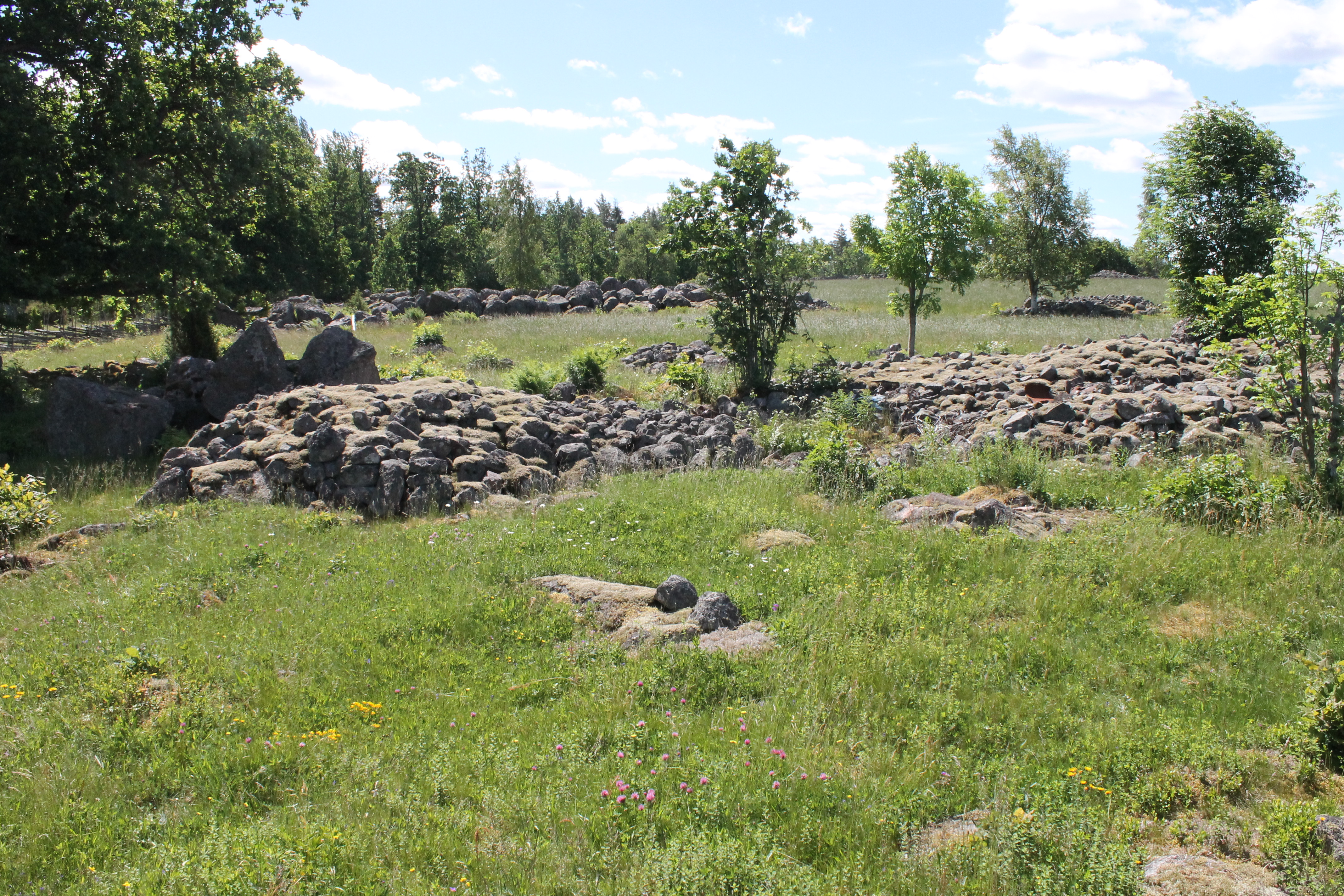 Ängsren i naturreservatet Södra Bråta, Östergötland, juni 2017.